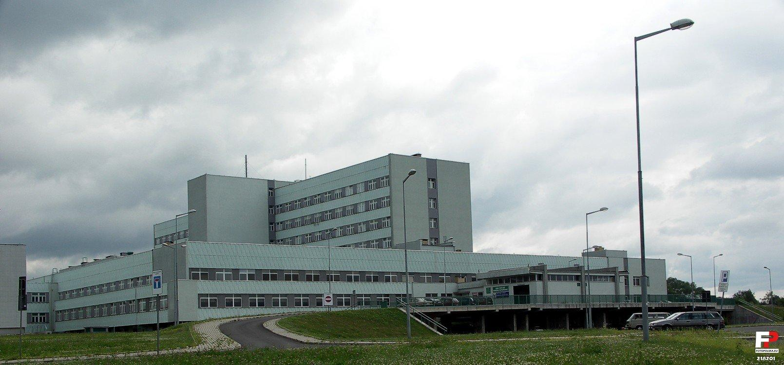 Widok szpitala od strony południowej.